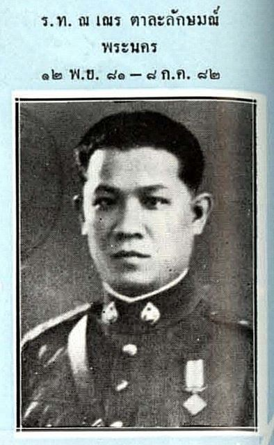 ร้อยโท ณ เณร ตาละลักษมณ์